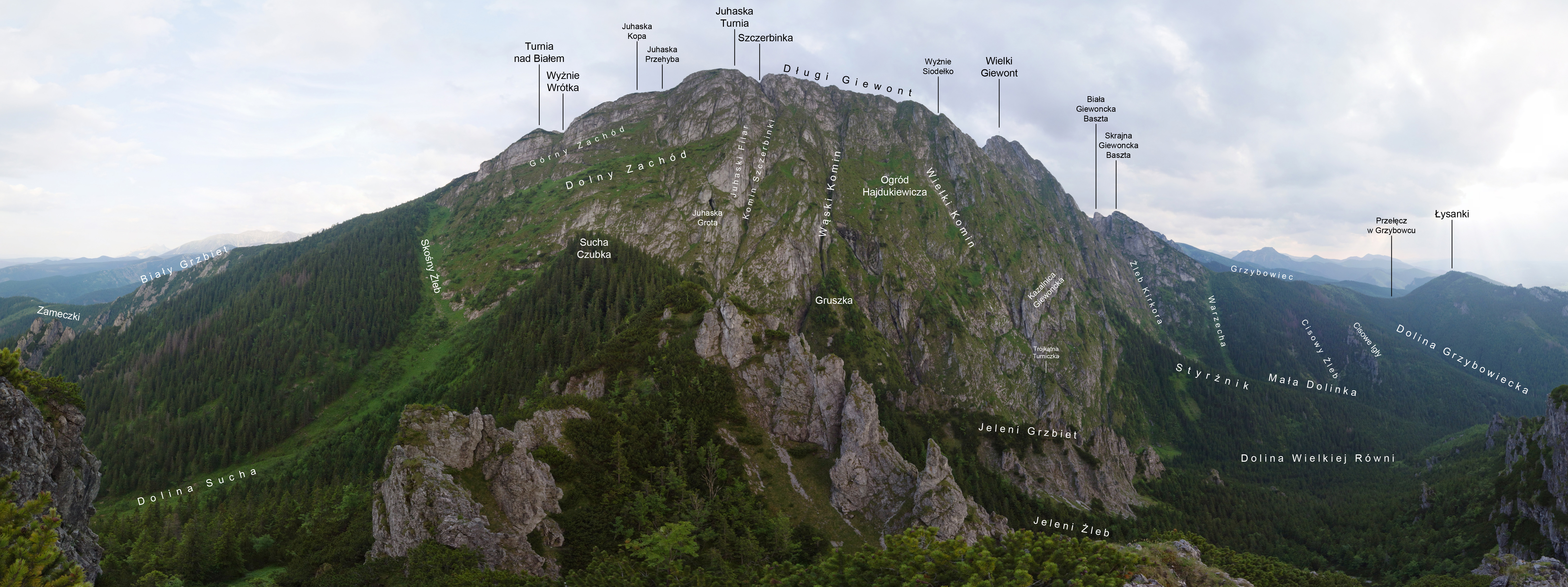 Długi Giewont – lewa część północnej ściany, podpisy.